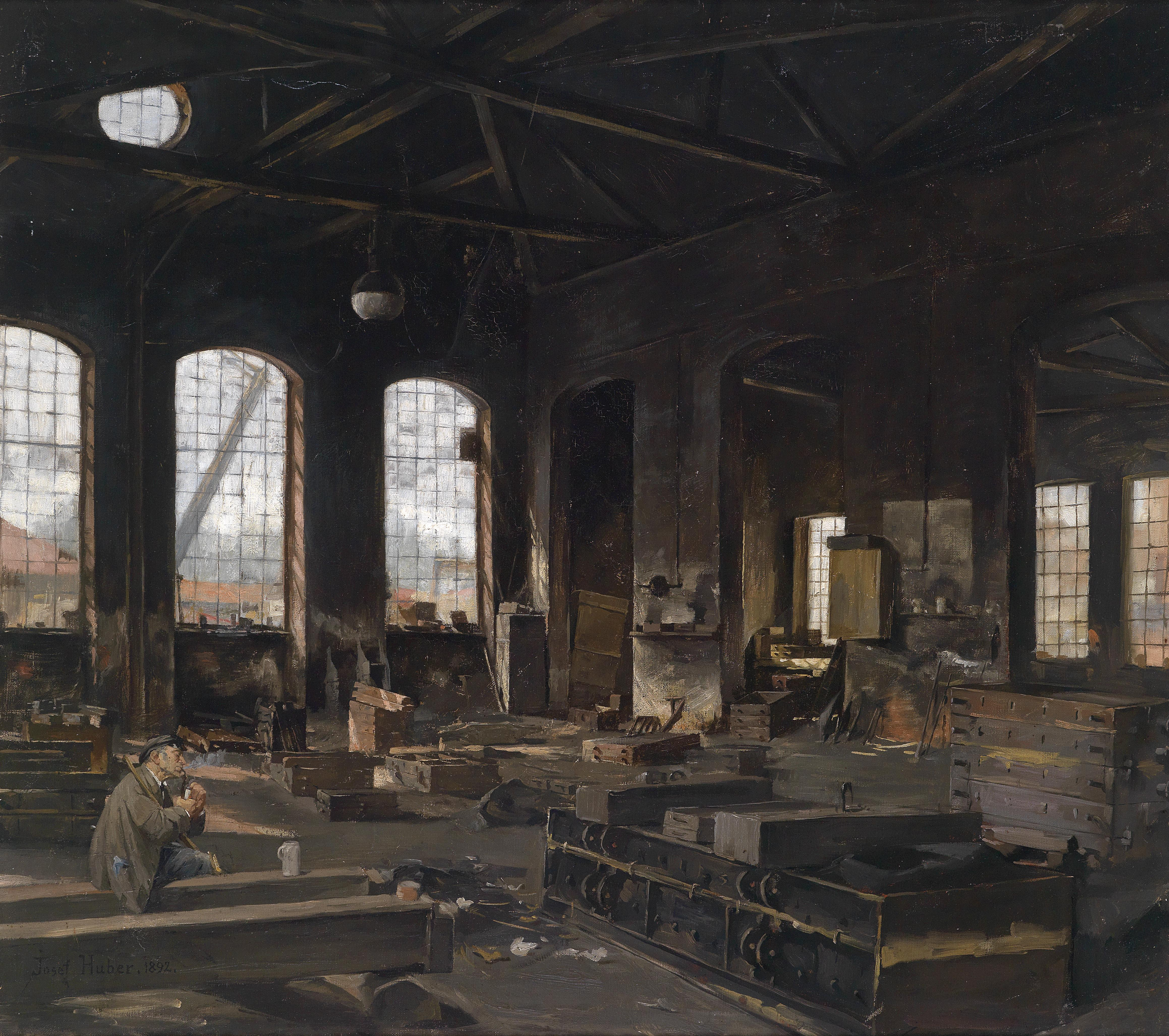 Mußestunde in der Werkstatt, signiert, datiert Josef Huber 1892, rückseitig Reste eines Ausstellungsetiketts: VI Internationale Kunstausstellung - München 1892, Öl auf Leinwand, 70 x 80 cm